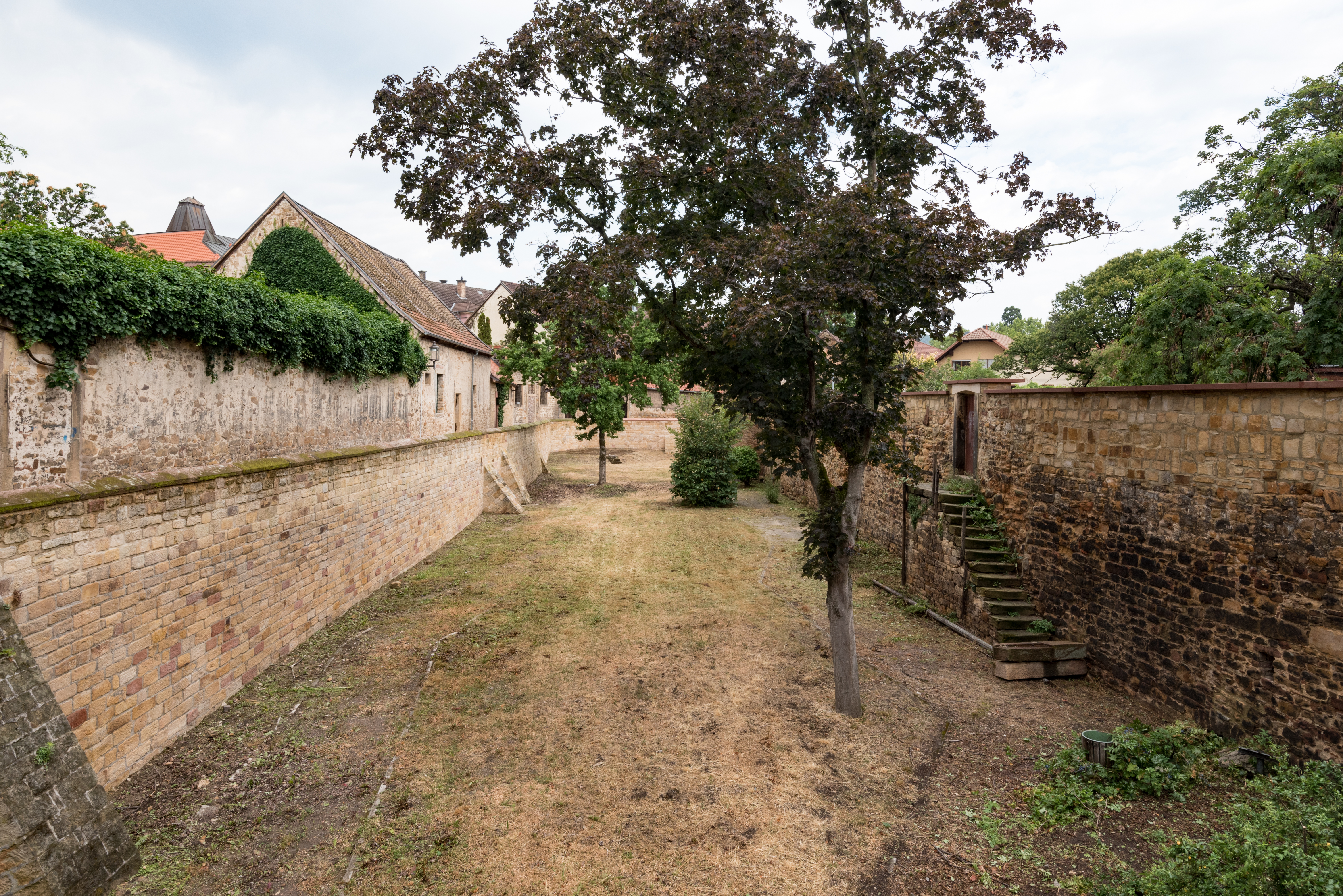 Deidesheim, Stadtgraben